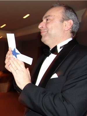 Constantin SANDU no Concerto da GLRP Dezembro 2007. Foto por Carlos Botelho